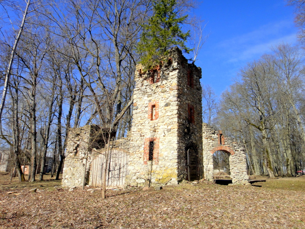 Artificial castle ruins near Kurmene manor